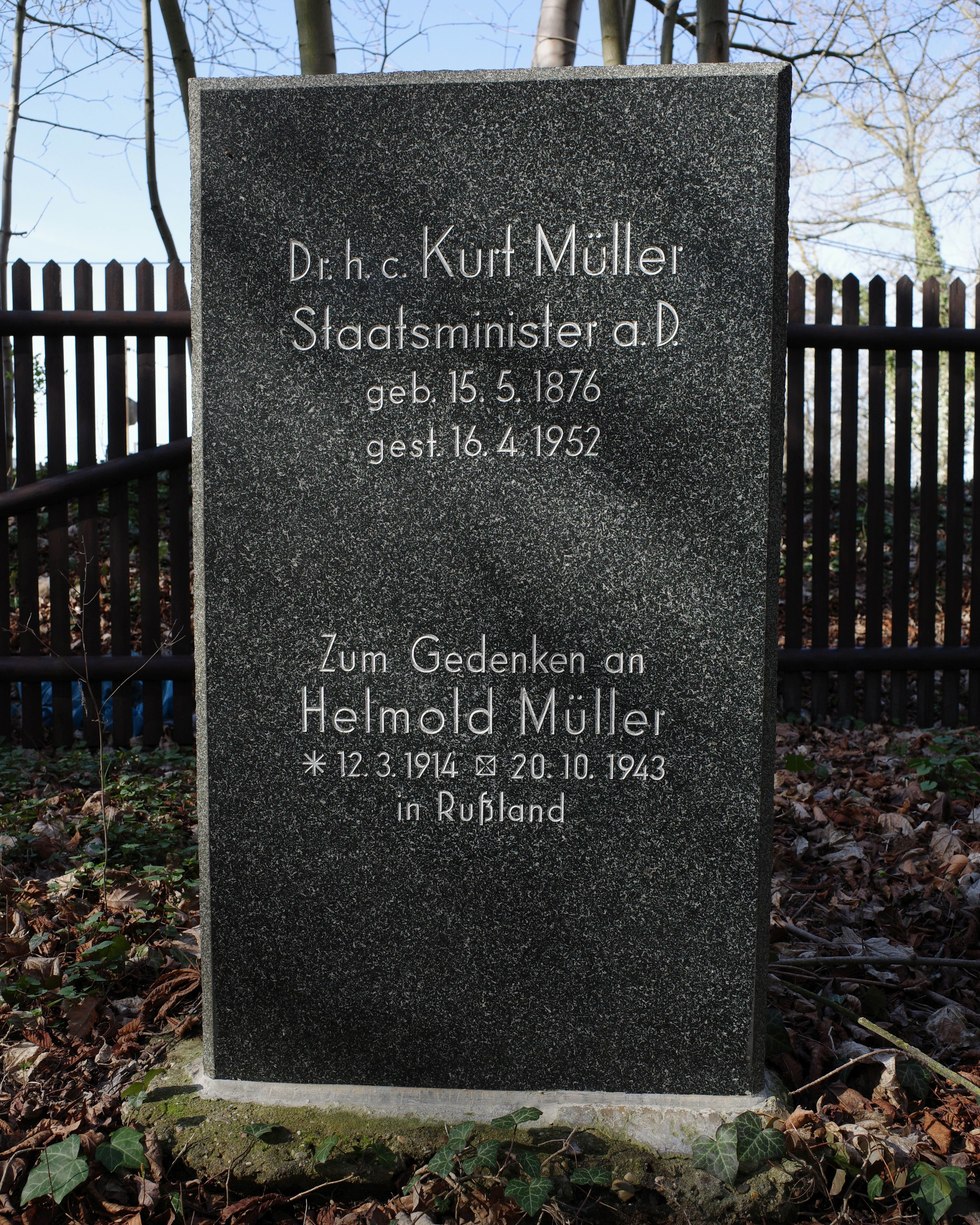 Dessau, Friedhof 3. Ruhestätte von Kurt Müller (Politiker, 1876 -1952).